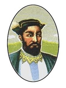 Duarte-coelho-pereira-2-10-03-1534